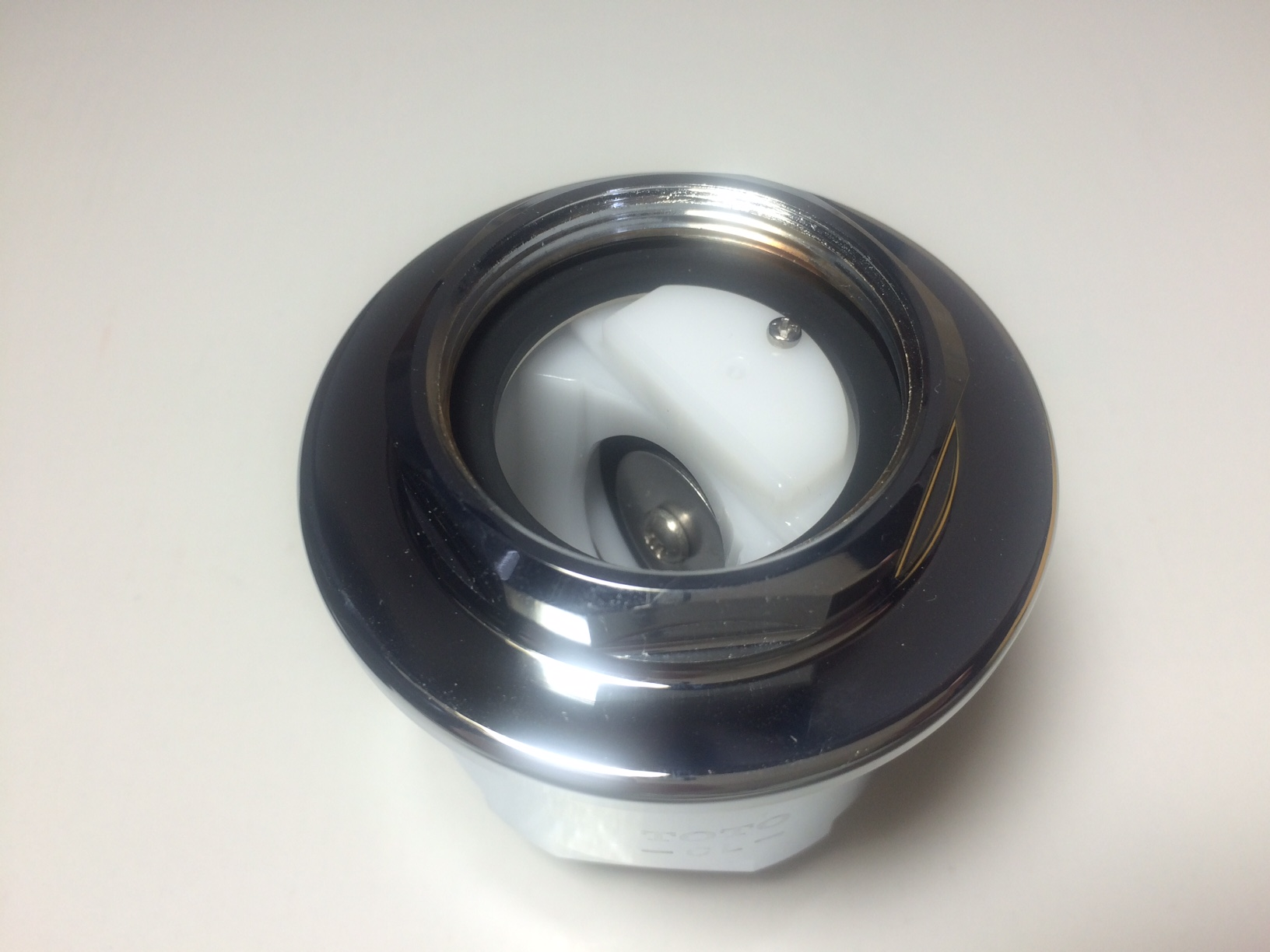 TOTO TV1N-1